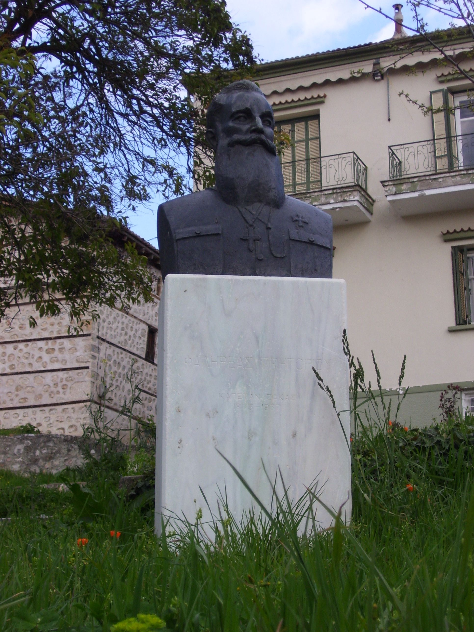 Паметник на гръцкия андартски капитан Григорис Фалиреас в град Костур, Егейска Македония, Гърция.